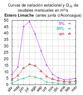 Curvas de variación estacional (5%, 85%) y caudal medio del estero Limache antes de junta con el río Aconcagua. # ANEXO 2, CURVAS DE VARIACION ESTACIONAL DE CAUDALES, pág. 15 , mes 5% 85% qm abr 7.87 1.20 3.95 may 13.76 3.66 7.25 jun 45.22 4.92 12.94 jul 49.10 6.62 15.99 ago 39.49 5.93 14.82 sep 26.37 4.50 10.56 oct 15.27 2.18 6.48 nov 7.97 1.72 4.39 dic 5.24 1.20 3.13 ene 3.92 1.20 2.43 feb 4.22 1.20 2.33 mar 4.74 1.20 2.92